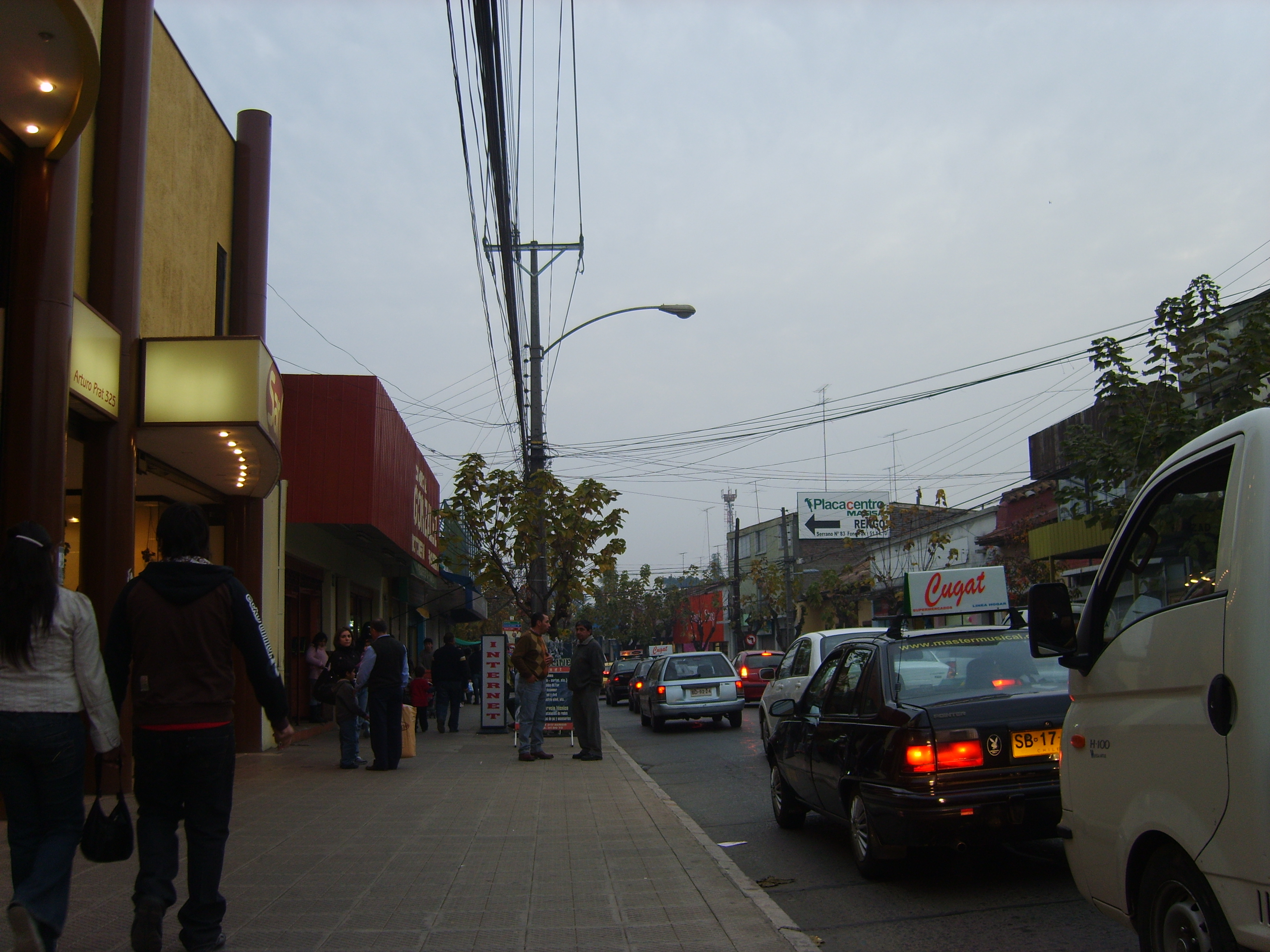 Congestión vehicular en el centro de Rengo, Chile